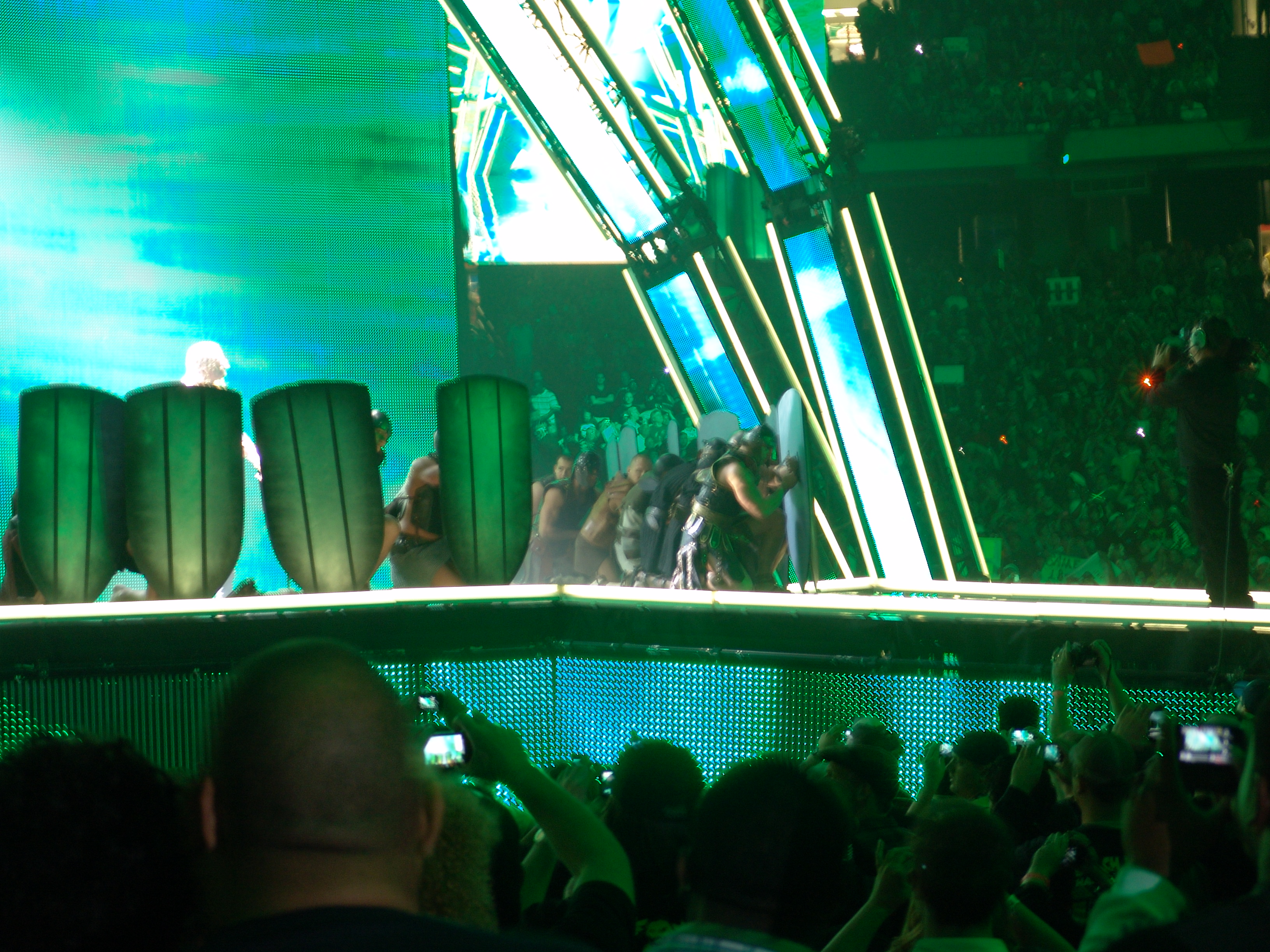 HHH entrando en WM 27